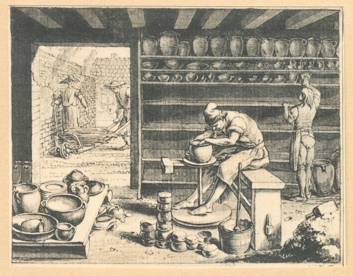 Tab. LV c. Der Töpfer. (Beschreibung lt. Quelle)